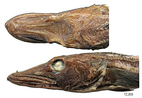 Head of Channichthys panticapaei Shandikov, 1995, dorsal and lateral views